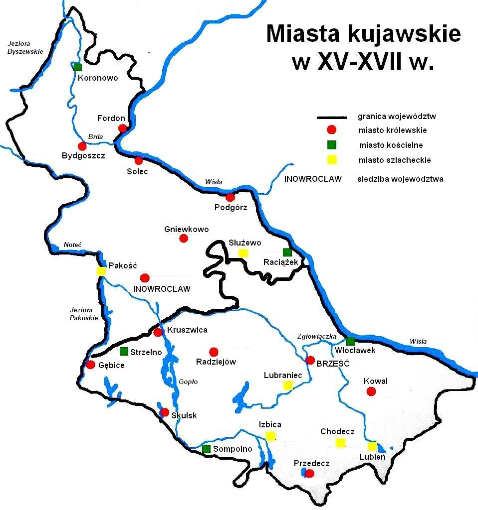 Miasta Kujaw w granicach Rzeczypospolitej Obojga Narodów (XV-XVIII w.) Opracowane na podstawie: Guldon Zenon: Podziały administracyjne Kujaw i ziemi dobrzyńskiej w XIII-XIV wieku: Warszawa, Poznań : Państwowe Wydawnictwo Naukowe, 1974, Guldon Zenon: Zaludnienie miast kujawskich w XVI i pierwszej połowie XVII wieku. Prace komisji historii BTN: Państwowe Wydawnictwo Naukowe oddział w Łodzi: 1963, Guldon Zenon. Lokacje miast kujawskich i dobrzyńskich w XIII-XVI w. [w:] Ziemia Kujawska II. Inowrocław-Włocławek, 1968